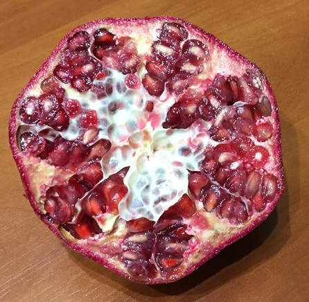 Zdjęcie przedstawia owoc granatu po przecięciu